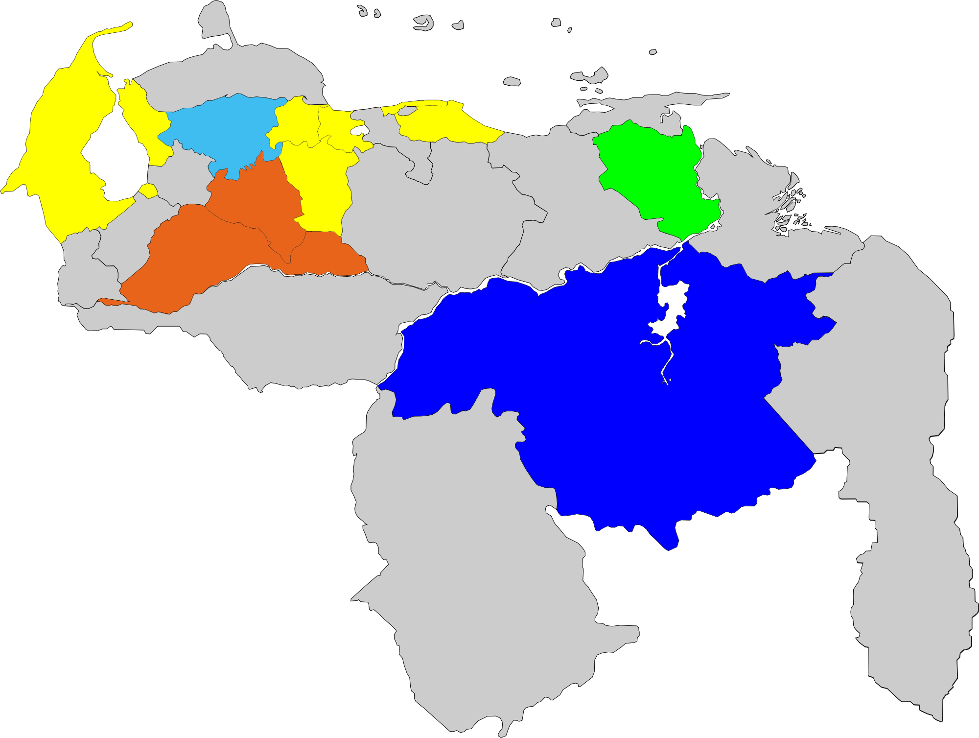 Tarjeta de la MUD, más votada por estado, ya que dicha organización no contaría con tarjeta propia como lo hacía desde 2012, datos obtenidos de la página: - Hecho con Adobe Photoshop